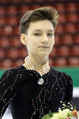 Адьян Питкеев на чемпионате мира среди юниоров 2014